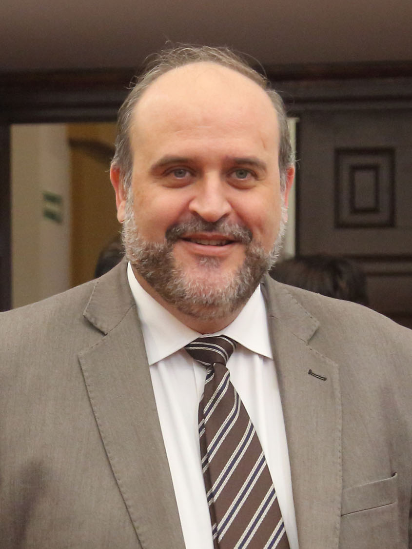 Toledo, 30-11-2017.- El vicepresidente primero del Gobierno regional, José Luis Martínez Guijarro, al inicio del Pleno de las Cortes regionales celebrado hoy en Toledo. (Foto: Álvaro Ruiz // JCCM)